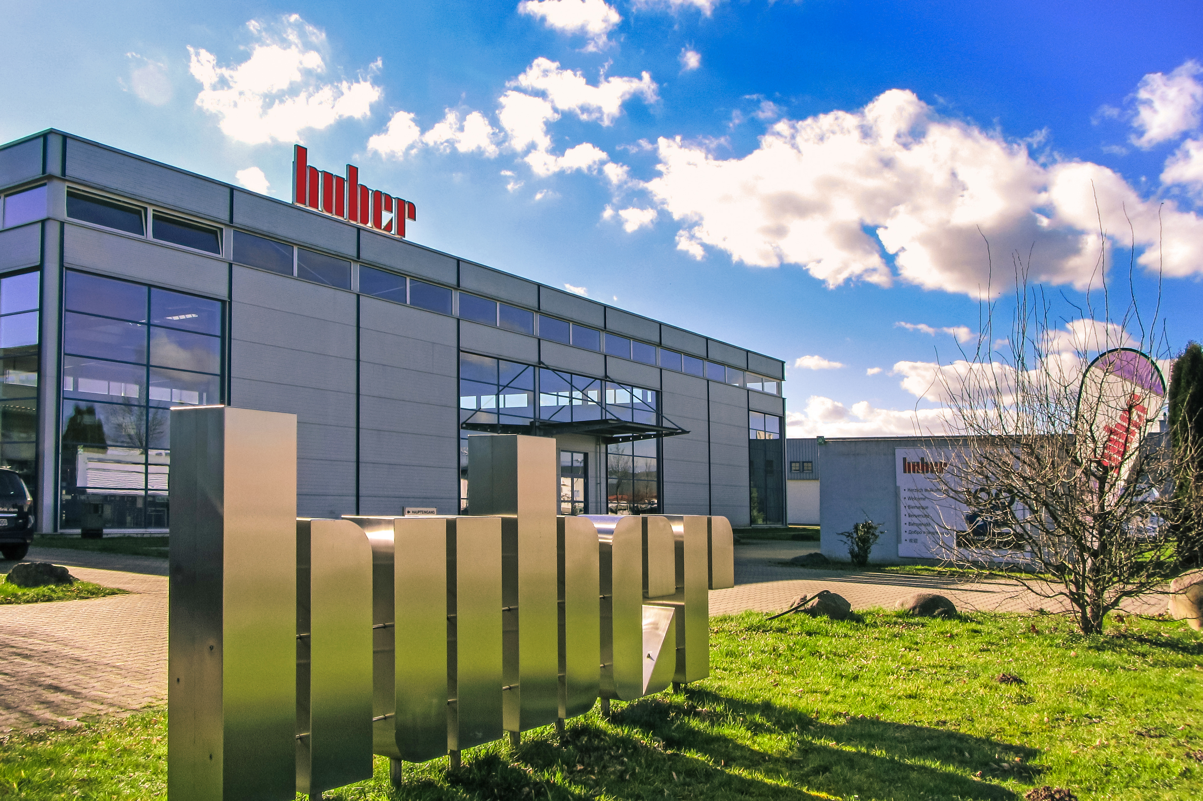 Firmengebäude der Peter Huber Kältemaschinenbau GmbH in Offenburg